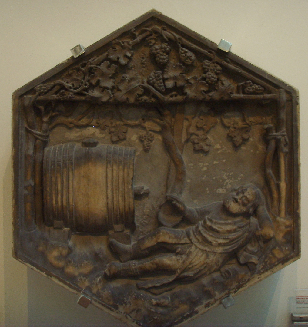 Formella 07, noè, collaboratore di andrea pisano (maestro di noè), 1334-1336